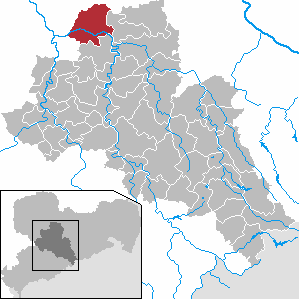 Leisnig in Saxony - district Mittelsachsen